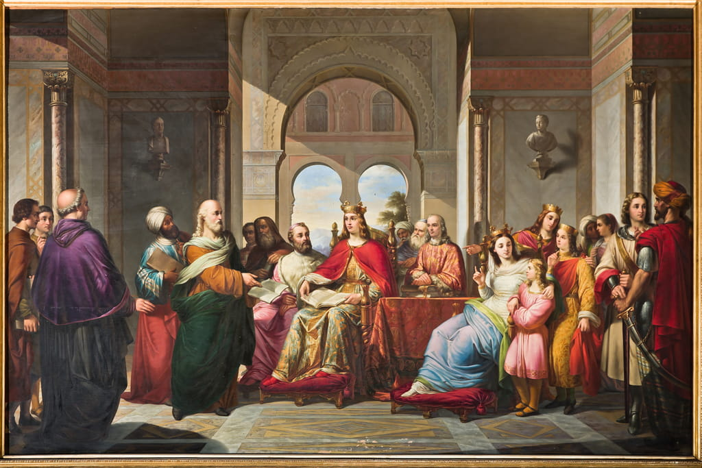 Federico II riceve dal filosofo Michele Scoto la traduzione delle opere di Aristotele, 1860